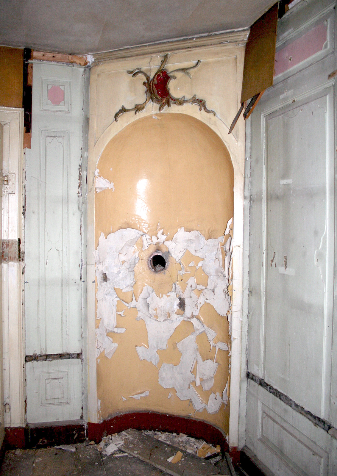 Gotha, Augustinerstraße 15, Amtshaus, Wandvertäfelung u. Ofenische oberhalb Stuck im Stil des Rokoko, 2011